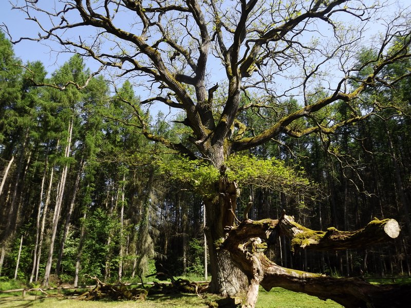 Naturschutzgebiet Goor-Muglitz auf Rügen, in der Goor, die Schirmeiche